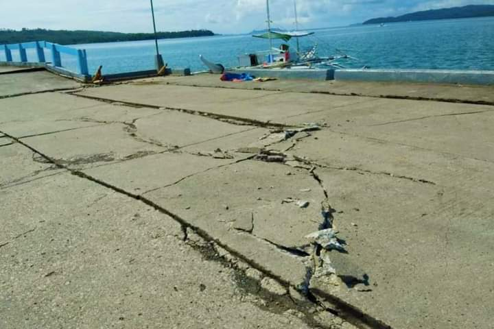 Tagalog: INCIDENT REPORT: Nagbitak-bitak ang ilang bahagi ng Cataingan Port matapos ang 6.5 magnitude na lindol sa Cataingan, Masbate kaninang umaga, ika-18 ng Agosto 2020. Sa kabila nito, ligtas ang lahat ng port personnel, tripulante, at mga mangingisda na nasa pantalan noong maganap ang insidente. Walang ring naitalang aksidente sa karagatan kasabay ng lindol. Ayon sa Coast Guard Station – Masbate, pansamantalang itinigil ang operasyon ng Cataingan Port habang nagpapatuloy ang safety assessment sa mga kritikal na bahagi ng pantalan. Muli namang binuksan ang Cataingan Port para sa biyahe ng mga sasakyang pandagat kaninang alas dose ng tanghali. Samantala, naramdaman rin ang malakas na pagyanig sa Coast Guard Regional Training Center sa Masbate kung saan nagsasanay ang 476 na female trainee ng PCG. Sa kabila nito, walang naitalang ‘casualty’ sa naganap na insidente. Pagkatapos ng lindol, agad na bumuo ng Deployable Response Group (DRG) ang Coast Guard Station – Masbate para mapabilis ang pagresponde sa Cataingan Port at mga kalapit na lugar. [Photos Courtesy of Coast Guard Station – Masbate] DOTrPH🇵🇭 CoastGuardPH MaritimeSectorWorks